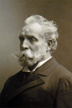 August Prokop (1838-1915), Rakouský architekt.